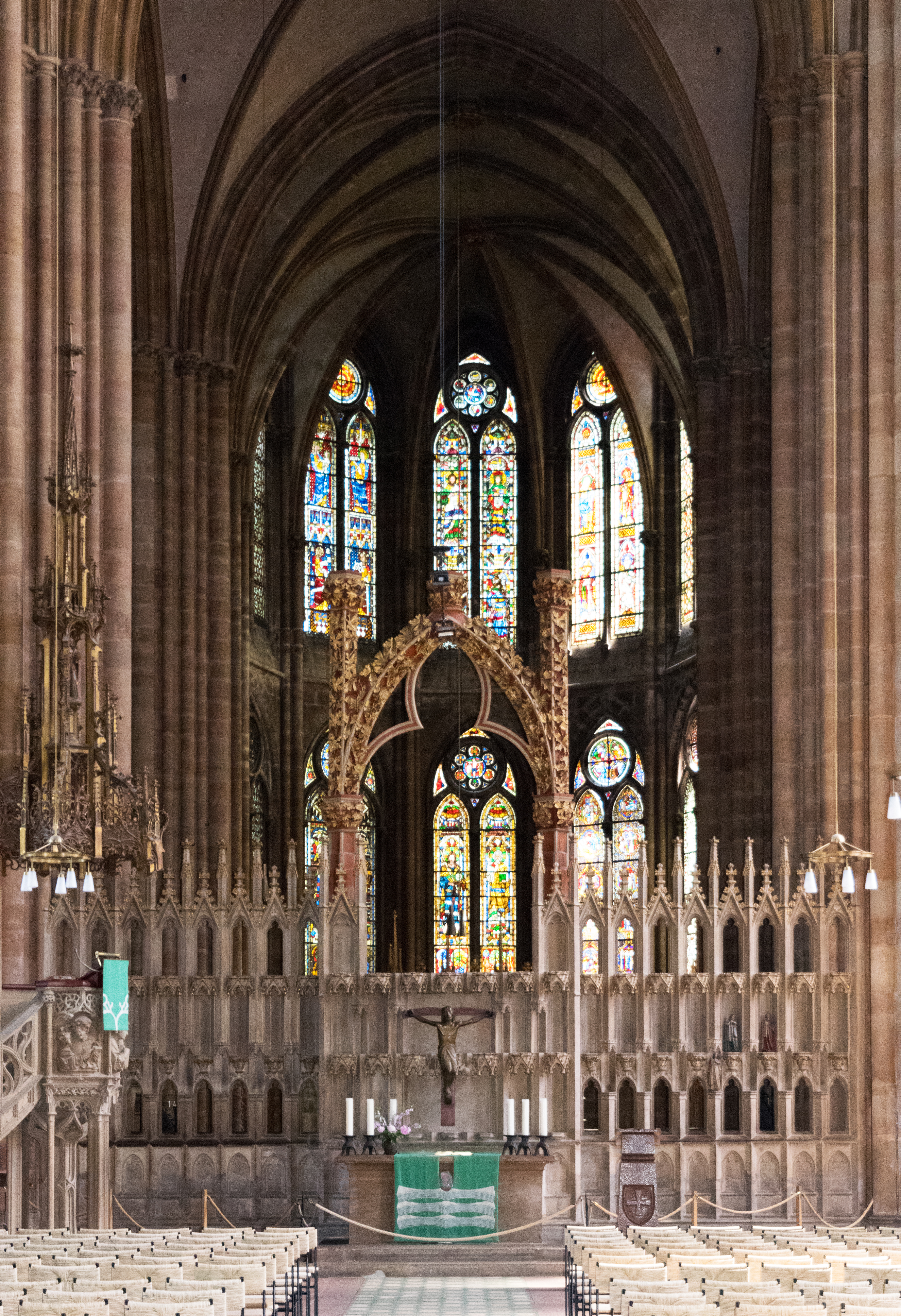 Interieur der Marburger Elisabethkirche